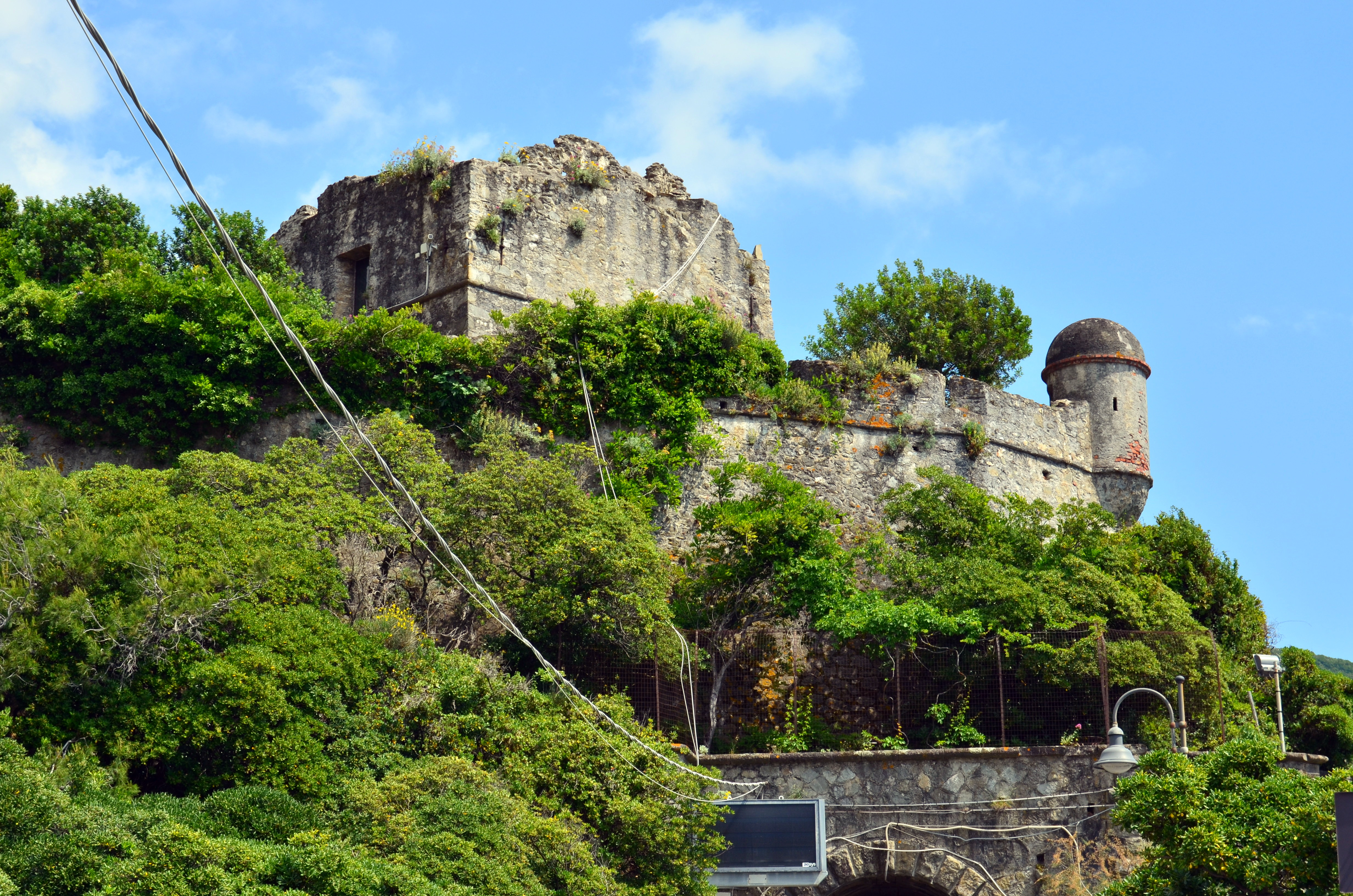 La fortezza di Villafranca, Moneglia, Liguria, Italia